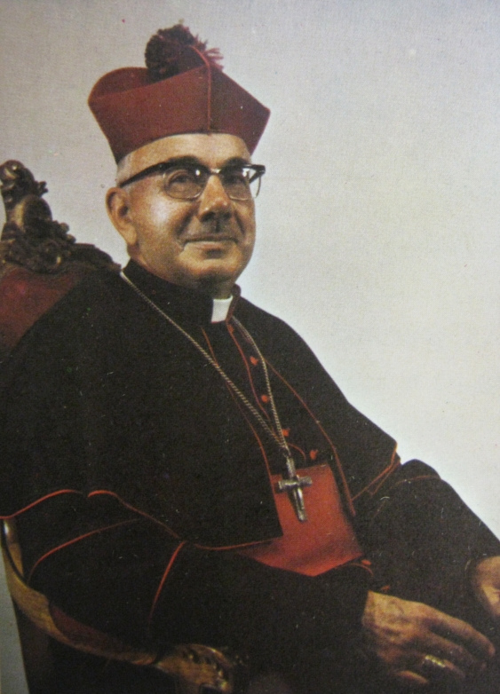 Monseñor Tulio Botero Salazar, arzobispo de la Arquidiócesis de Medellín entre los años 1958 y 1979.